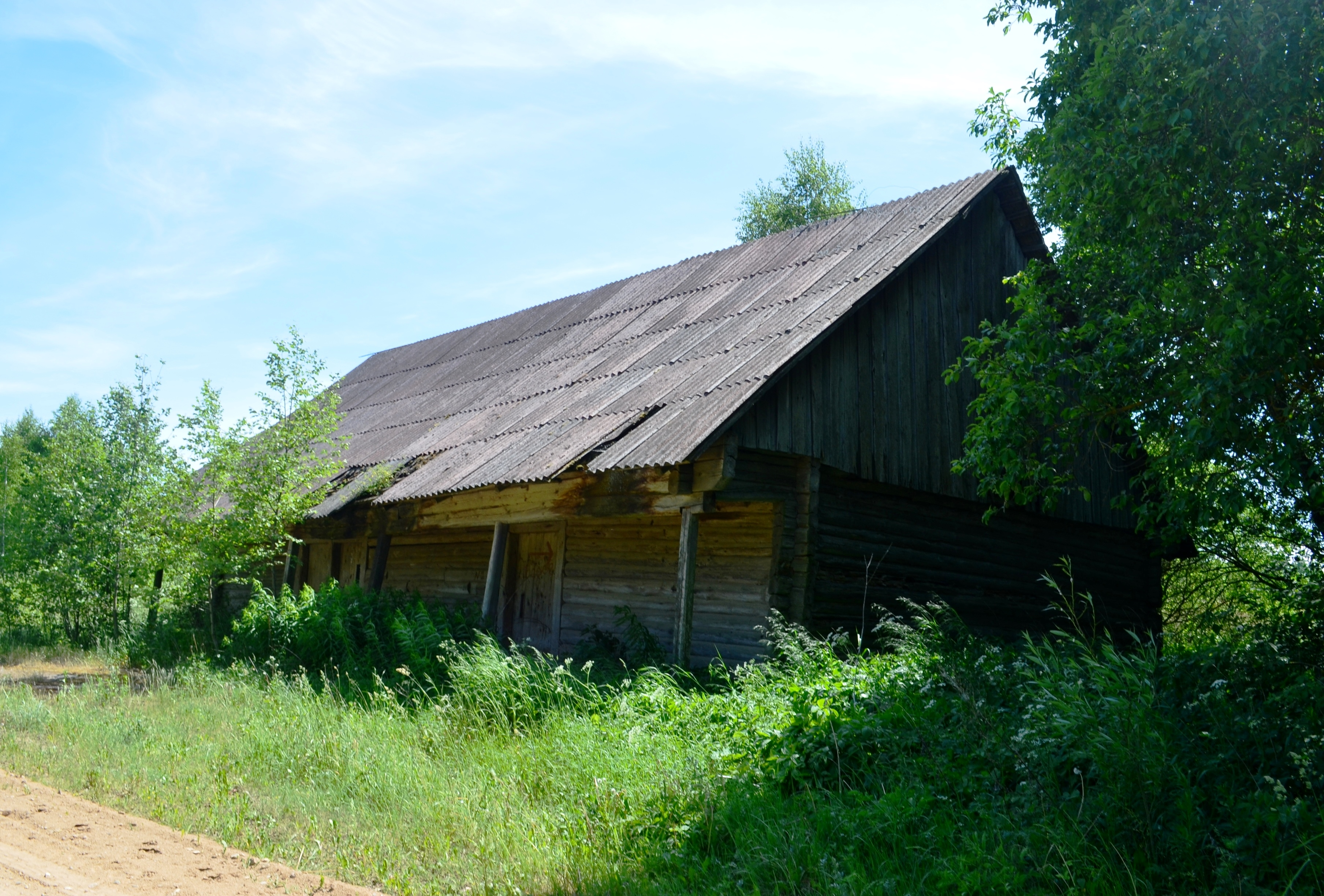 Senovinė daržinė, Stankai, Vilniaus raj.